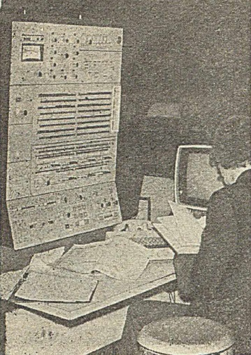 IBM 360-50, ZETO ZOWAR